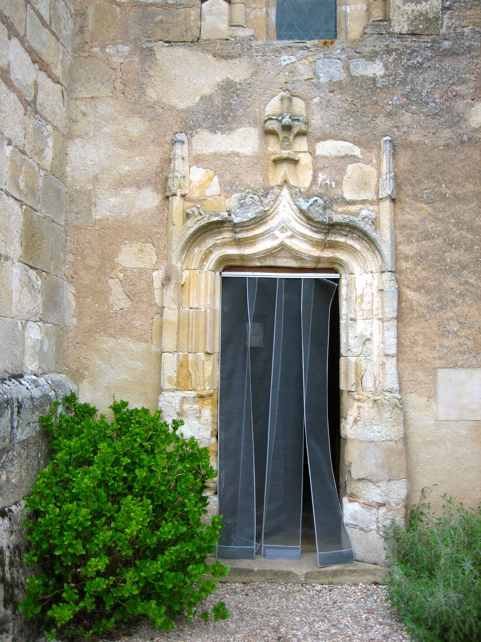 Porte latérale sud de l'église Saint-Georges à Saint-Jeanvrin